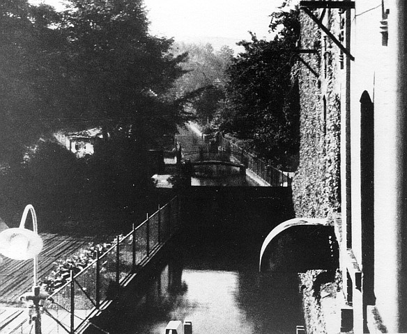 Original image description from the Deutsche FotothekFreital- Deuben. Egermühle, Mühlgraben 1909, aus: Die Egermühle 1876–1926